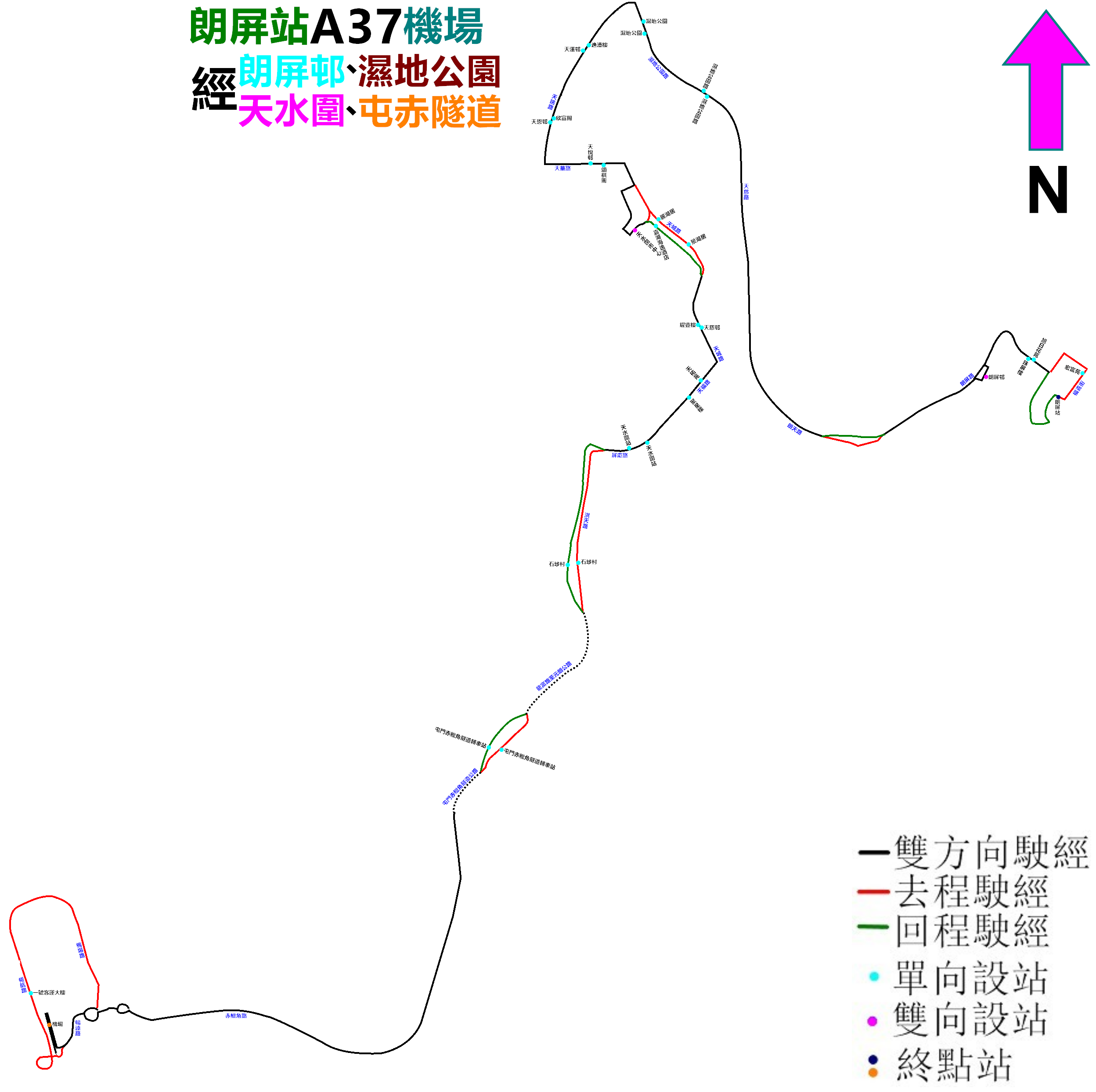 中文（香港）: 龍運巴士A37線的走線圖